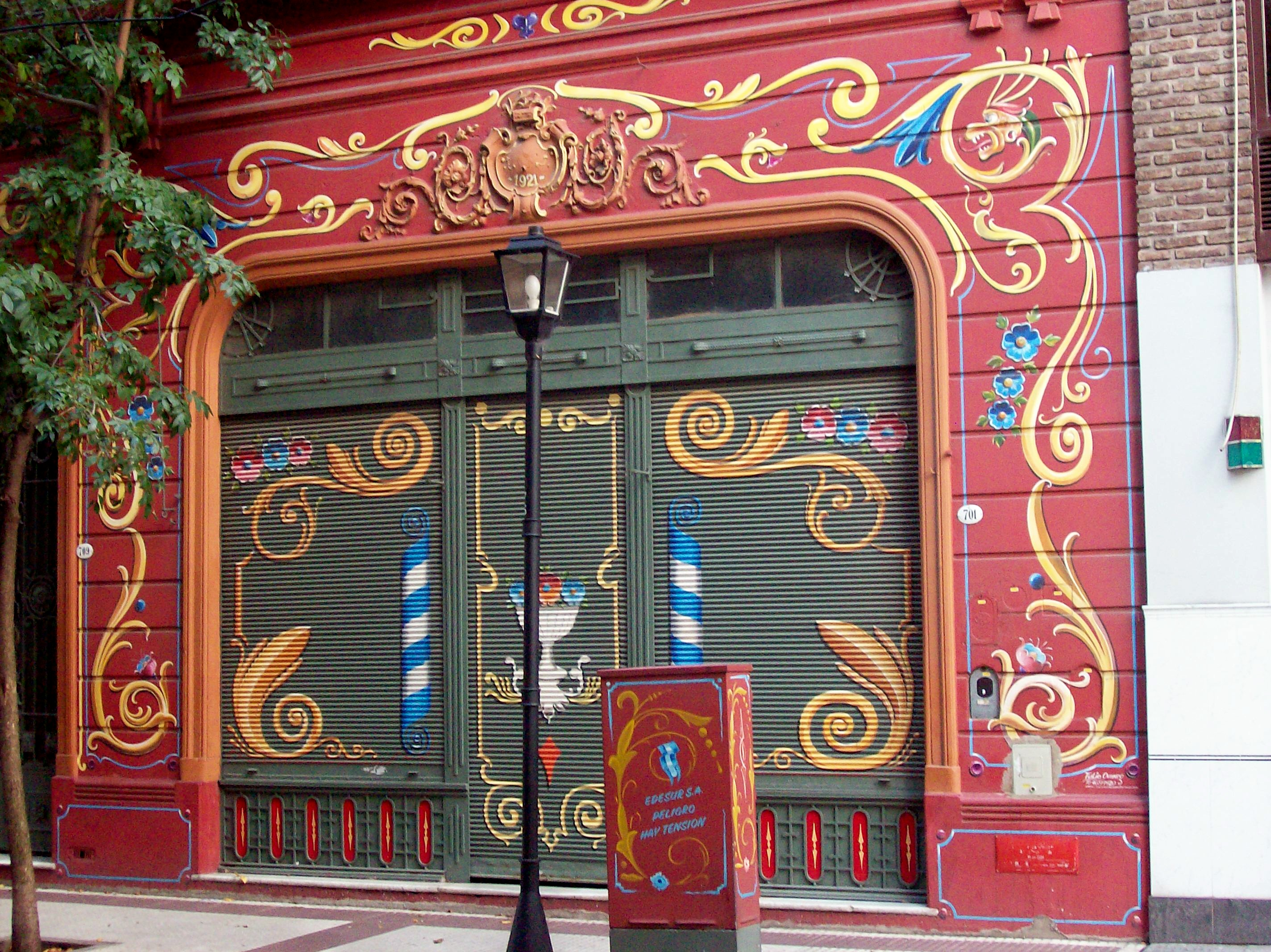 FILETEADO PORTEÑO: Buenos Aires, calle Jean Jaures 709 ("Paseo del Filete") frente pintado por Tulio Ovando